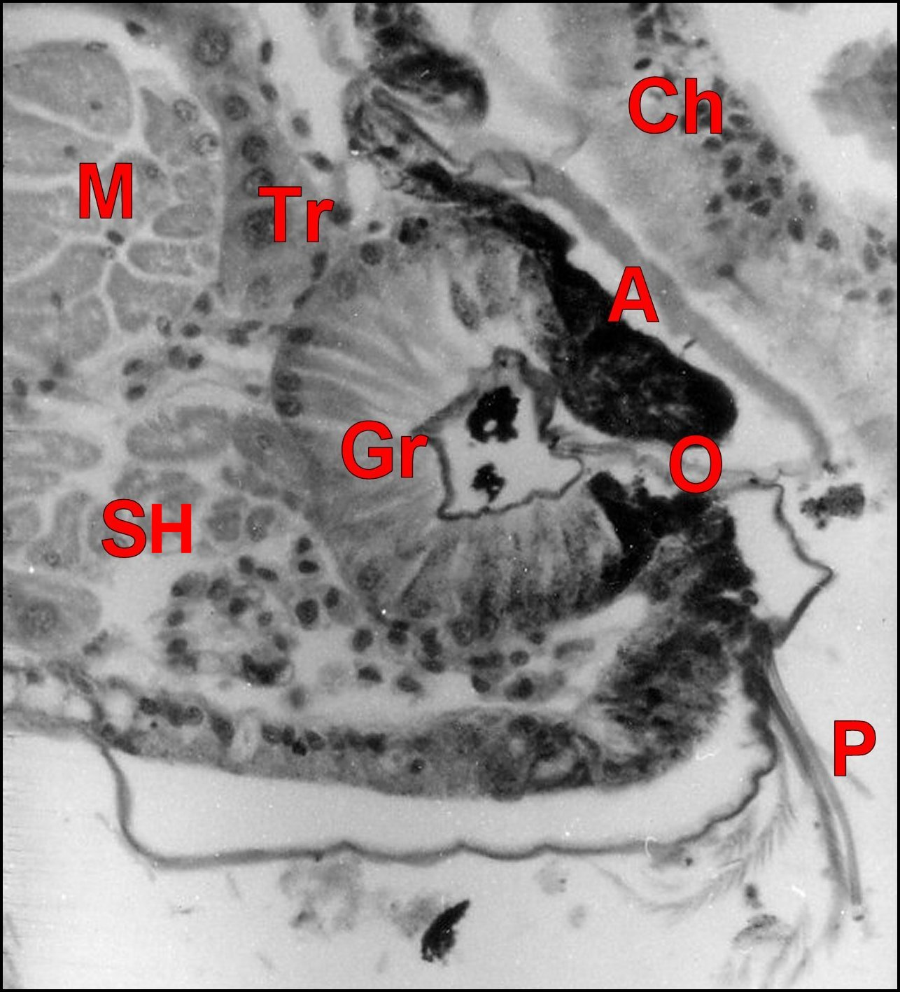 Coupe histologique parasagittale d'un rostre d' Argyrodes montrant la glande rostrale.